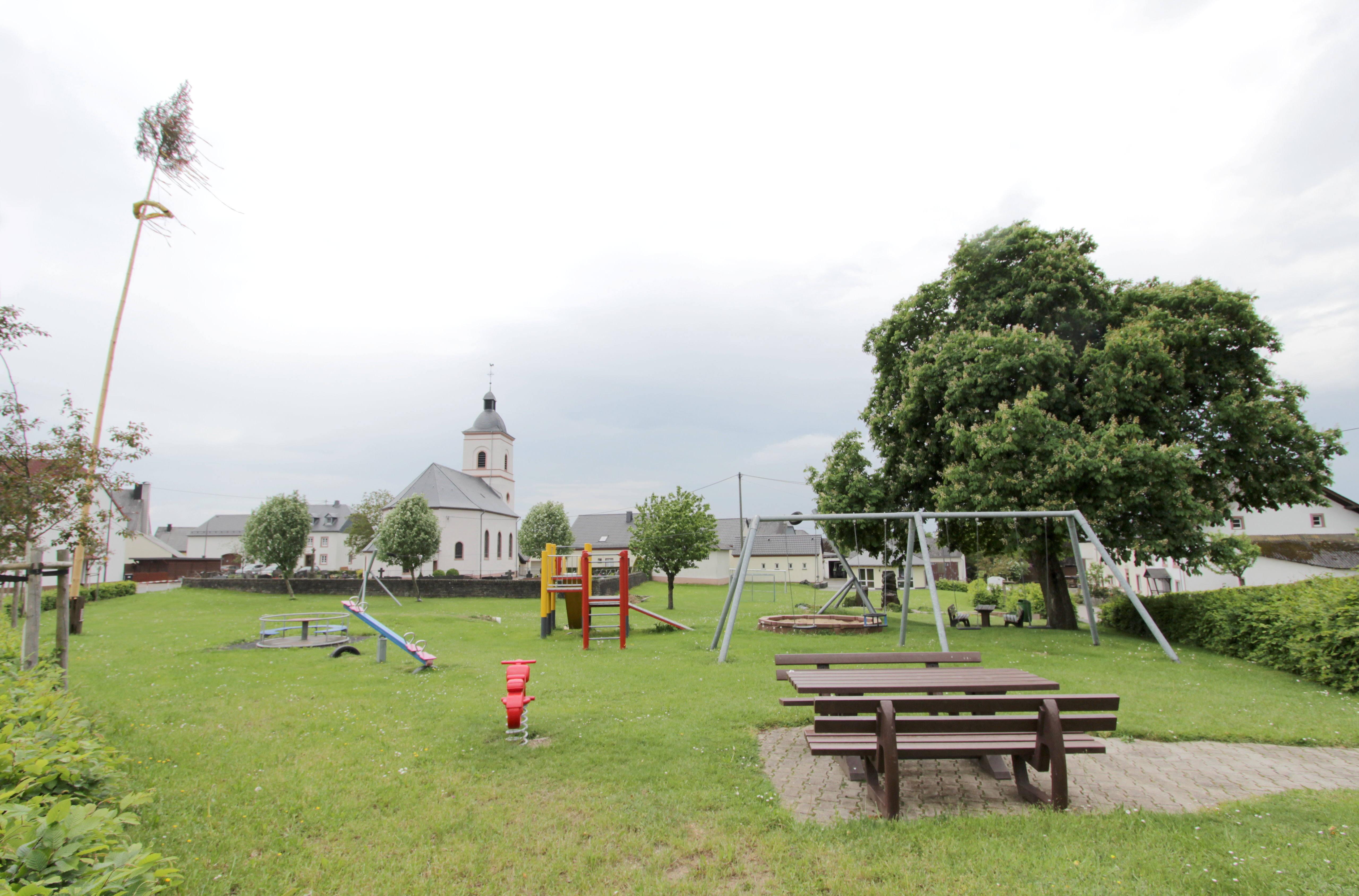 54689 Preischeid, Schulstraße. Kinderspielplatz bei der Kirche Sankt Peter. Aufnahme von 2018.